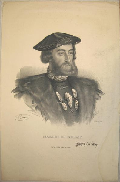 Martin du Bellay (1495-1559), prince d'Yvetot, historien, lieutenant général en Normandie